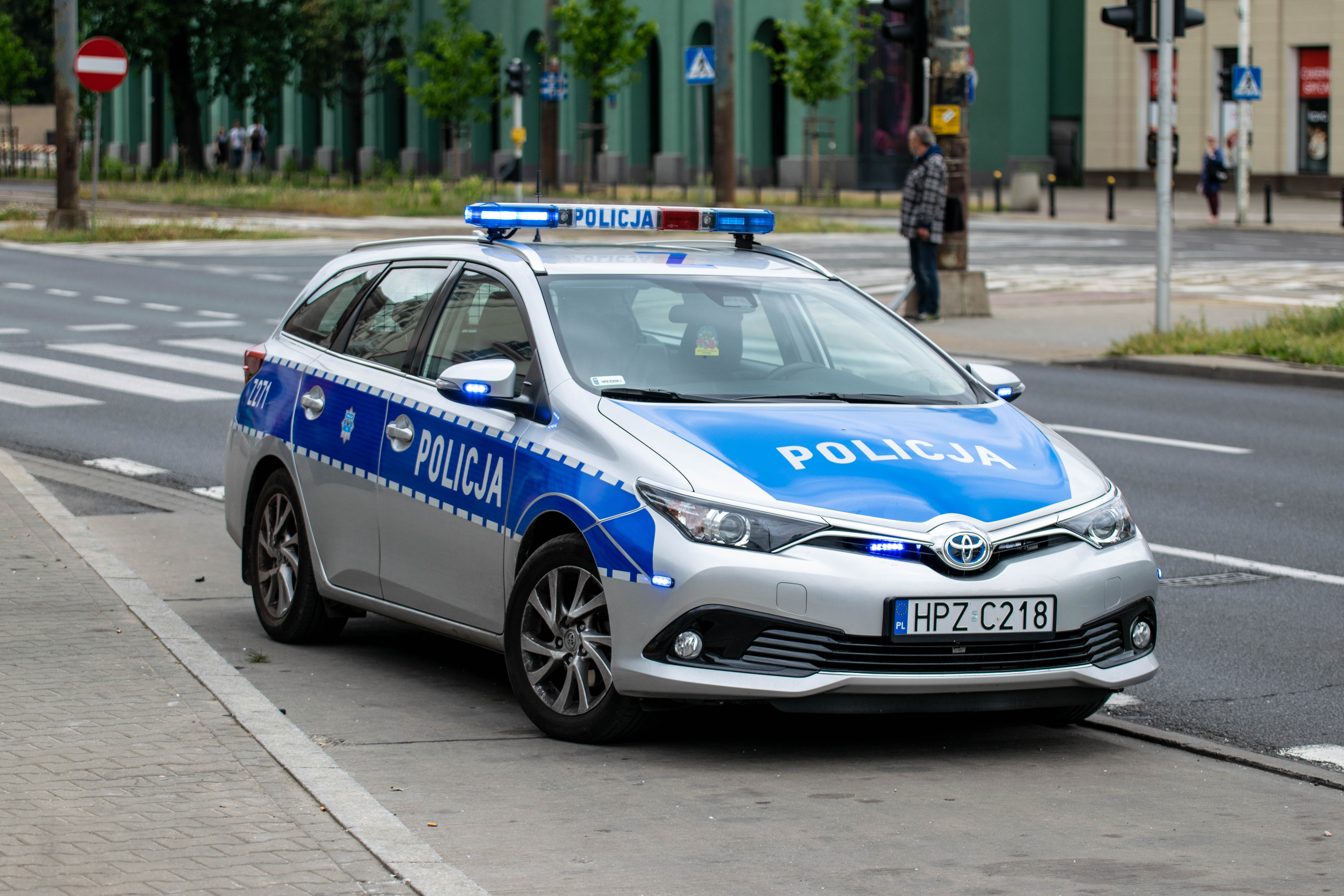 Voiture de police à Varsovie, Toyota Auris